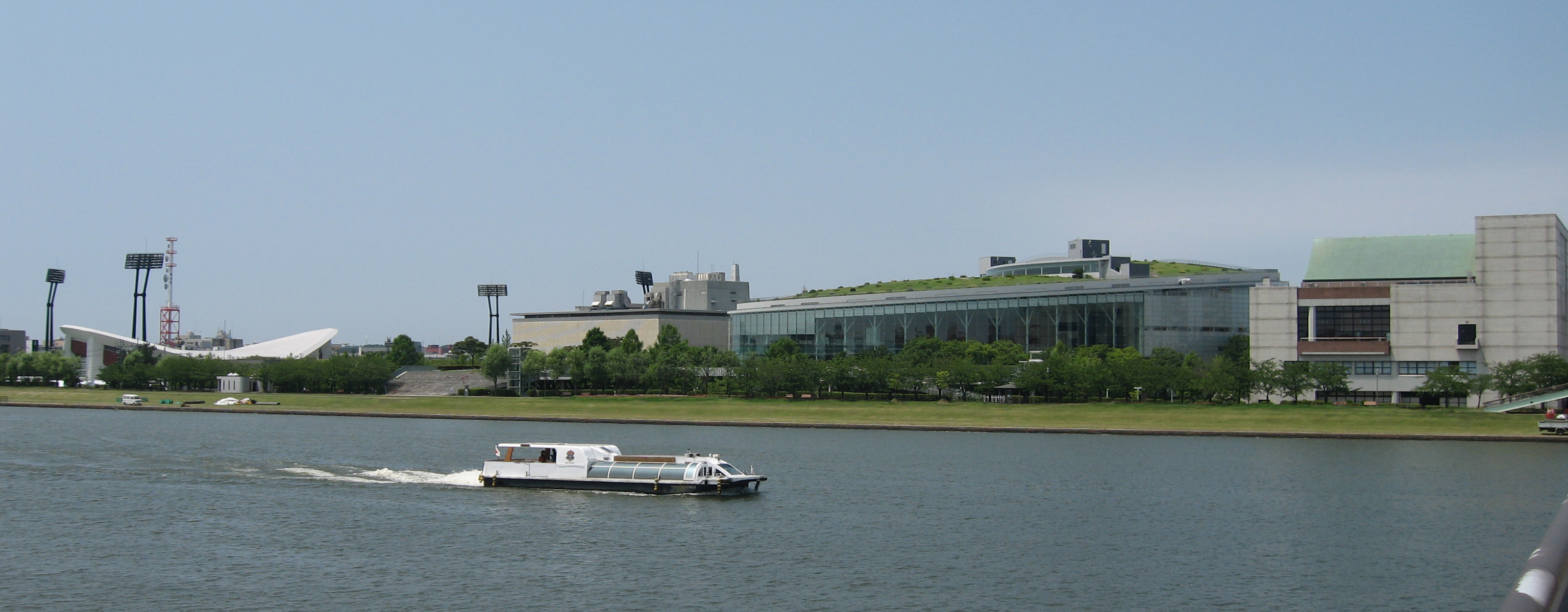 新潟県新潟市中央区。昭和大橋から見た、白山公園の劇場郡